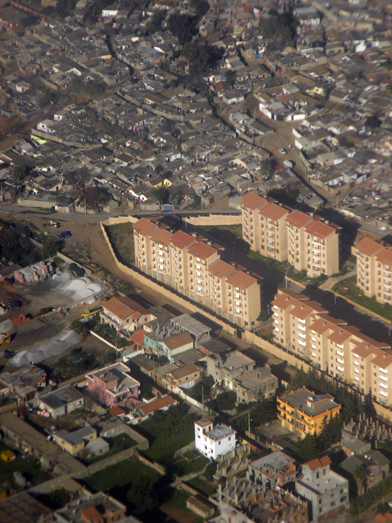 Vue aérienne du quartier de Ain Kahla à H'raoua